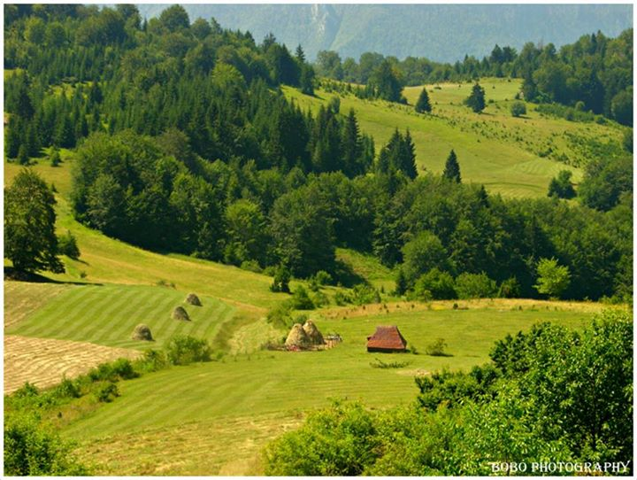 Srpski (latinica): Pogled sa planine Pliješ